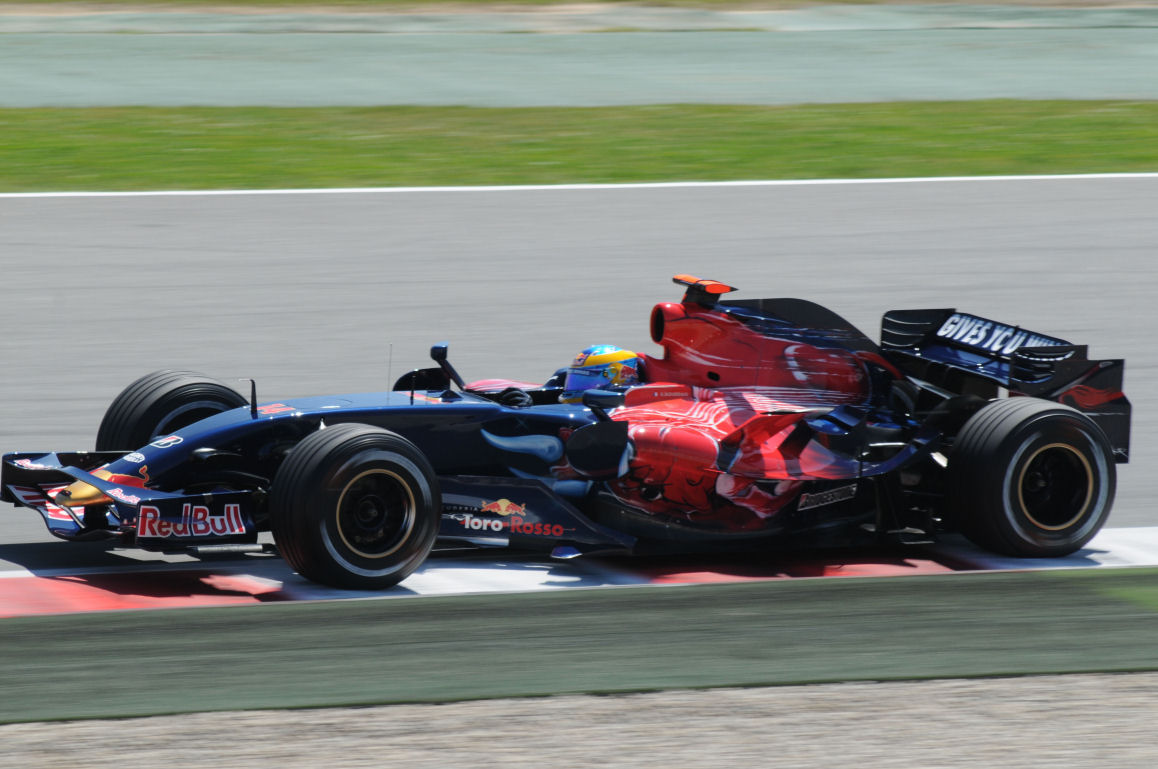 Sébastien Bourdais während des Samstag-Trainings zum GP Spanien 2008